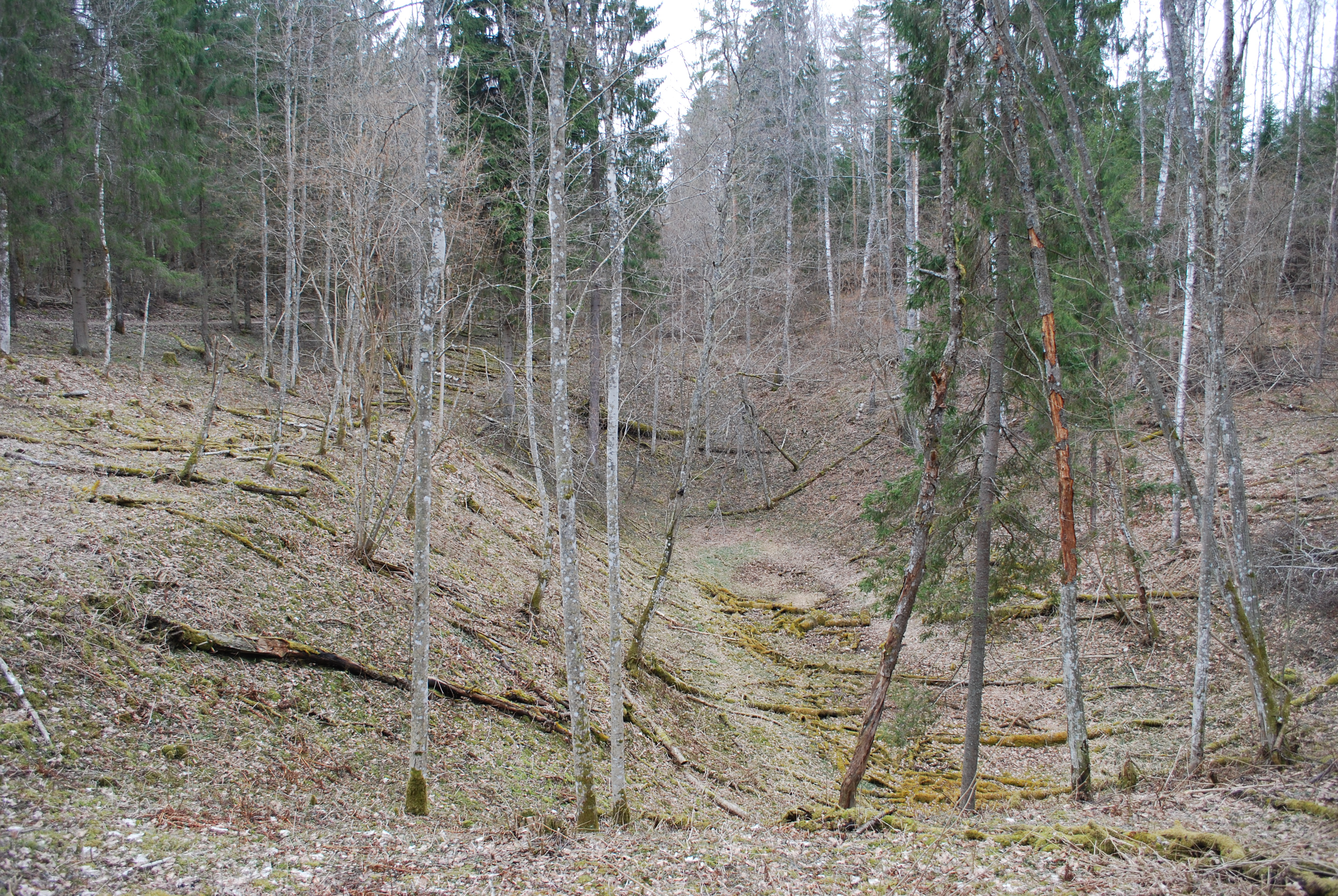 Üks Vanapagana jäljehaudadest Paganamaal, Võrumaal.